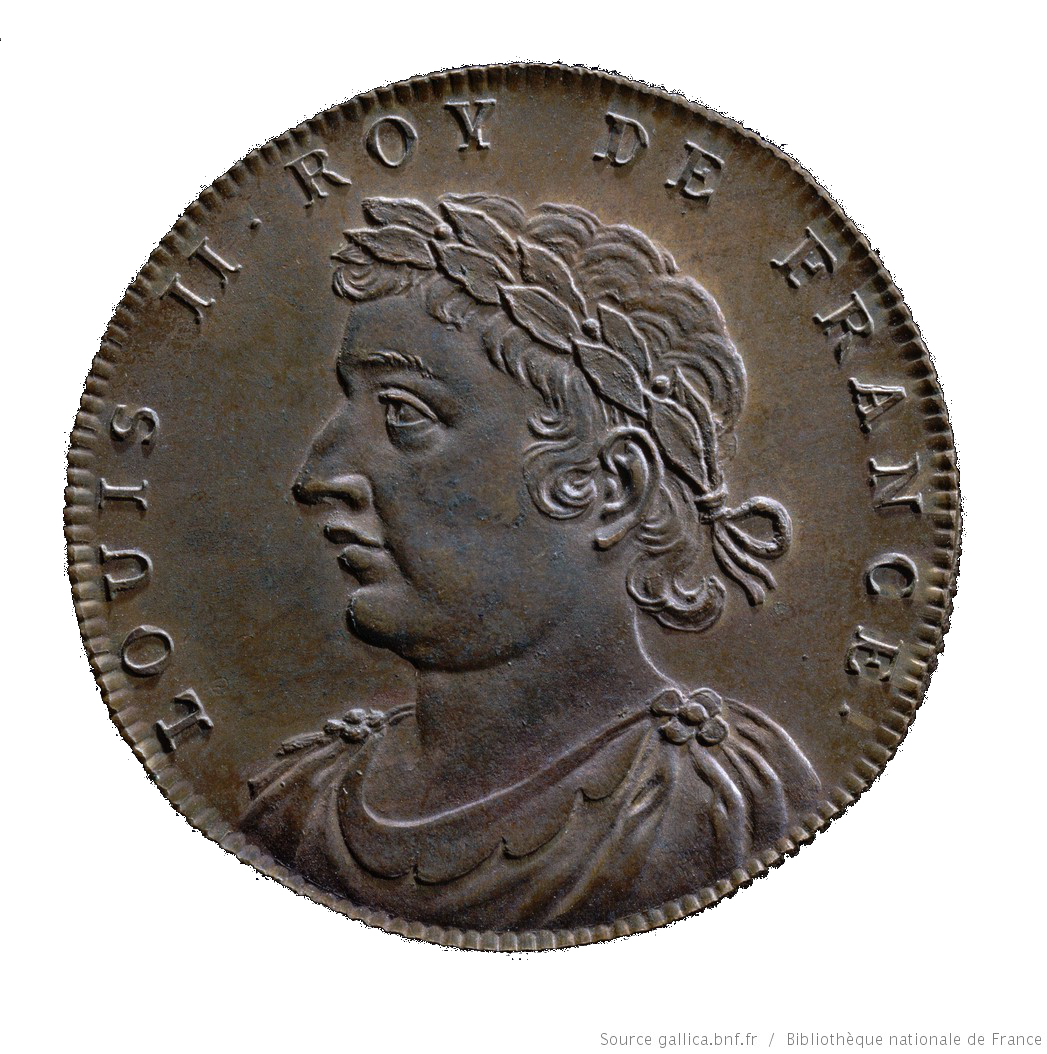 Jean Dassier (1676-1763) - Louis II. roy de France. (846-879). Buste du roi à gauche, lauré.